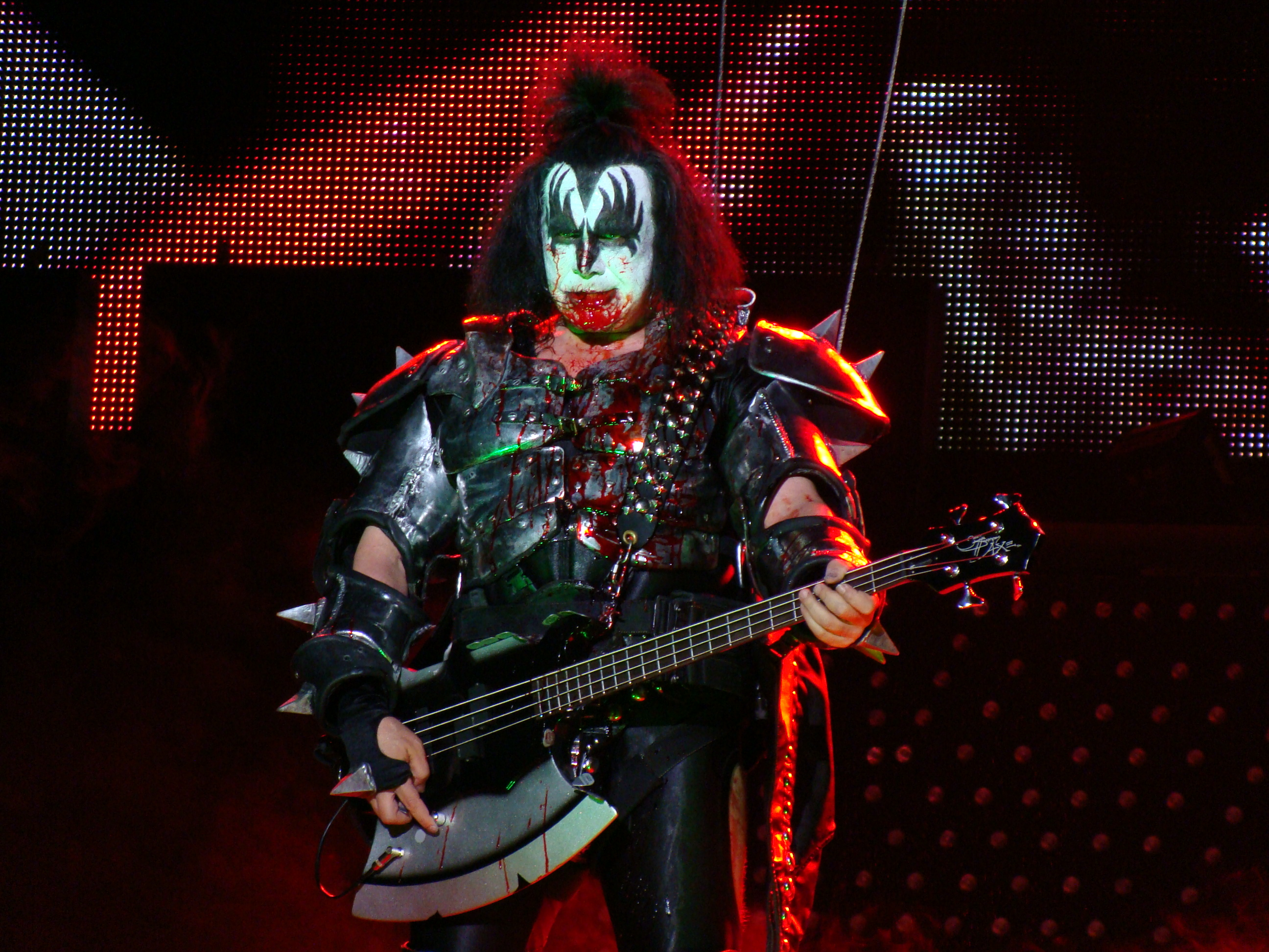 Gene Simmons, en una actuación del grupo KISS en Vitoria-Gasteiz, en el Azkena Rock Festival.